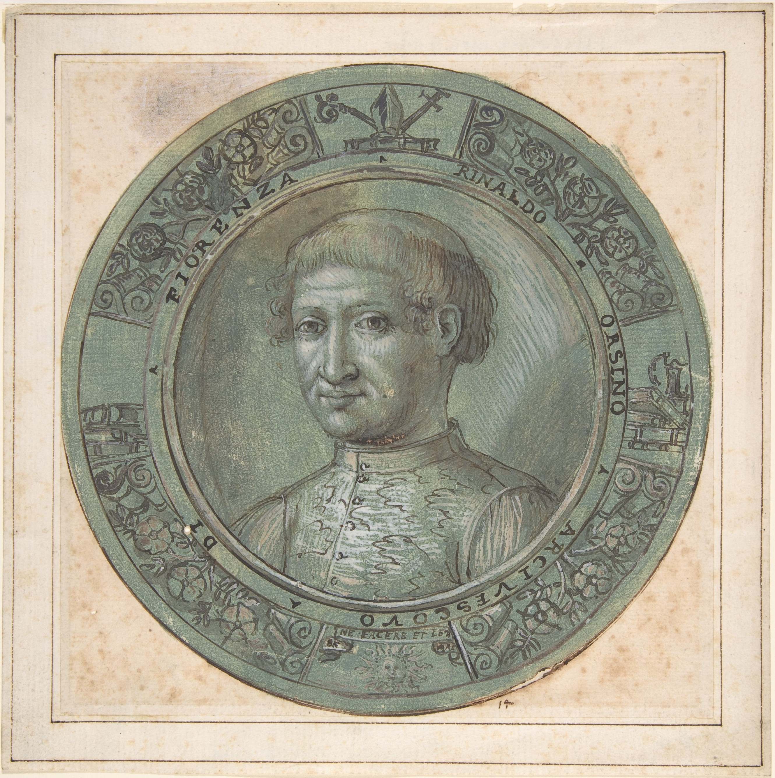 Drawing; Drawings